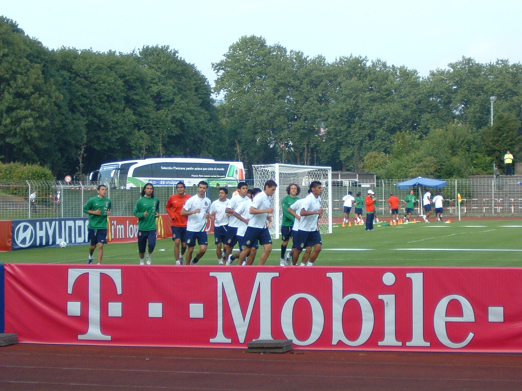 el equipo practicando en Alemania